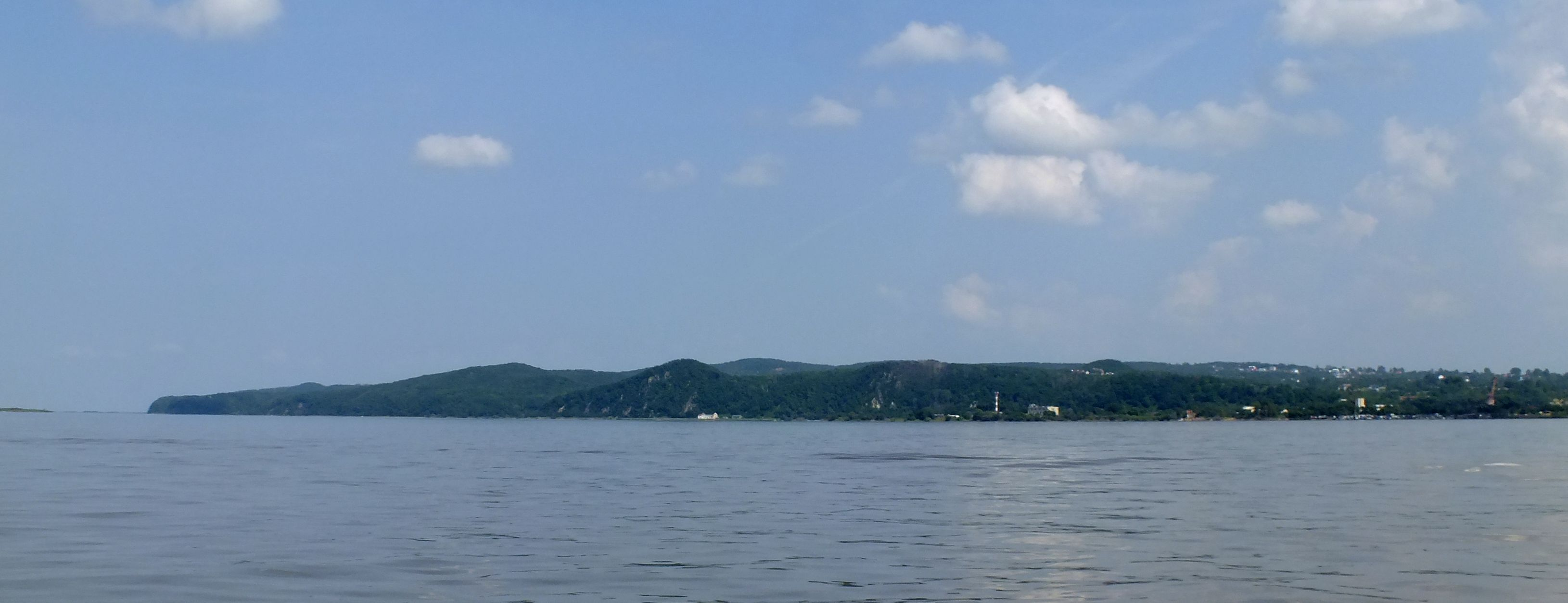 Воронежские высоты, Хабаровский край